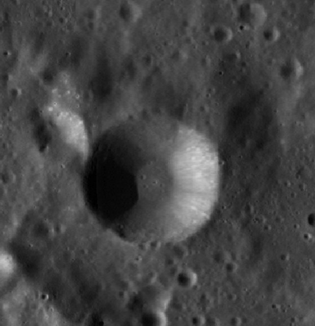 Cráter lunar Glauber (Imagen LRO)